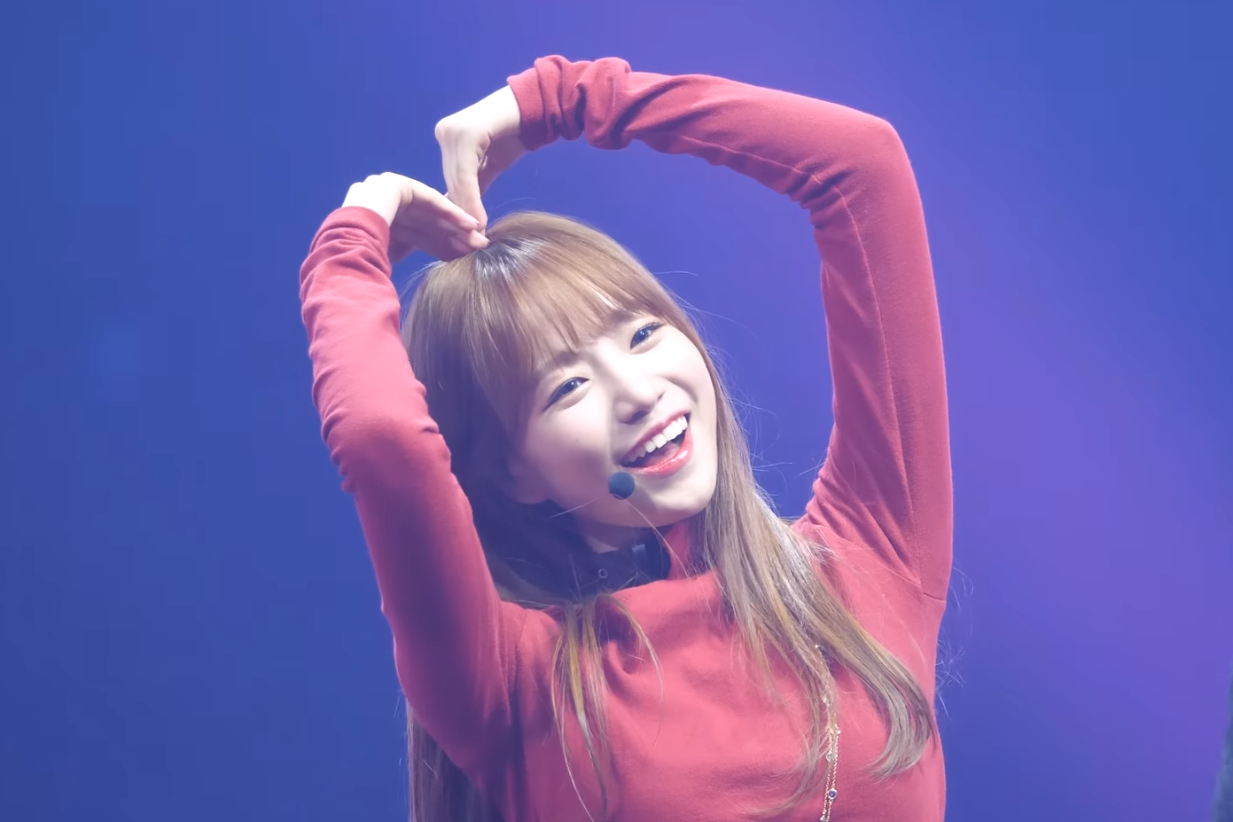 아이즈원 (IZ*ONE) '멤버별 데뷔소감' 직캠 Fancam @IZ*ONE SHOW-CON